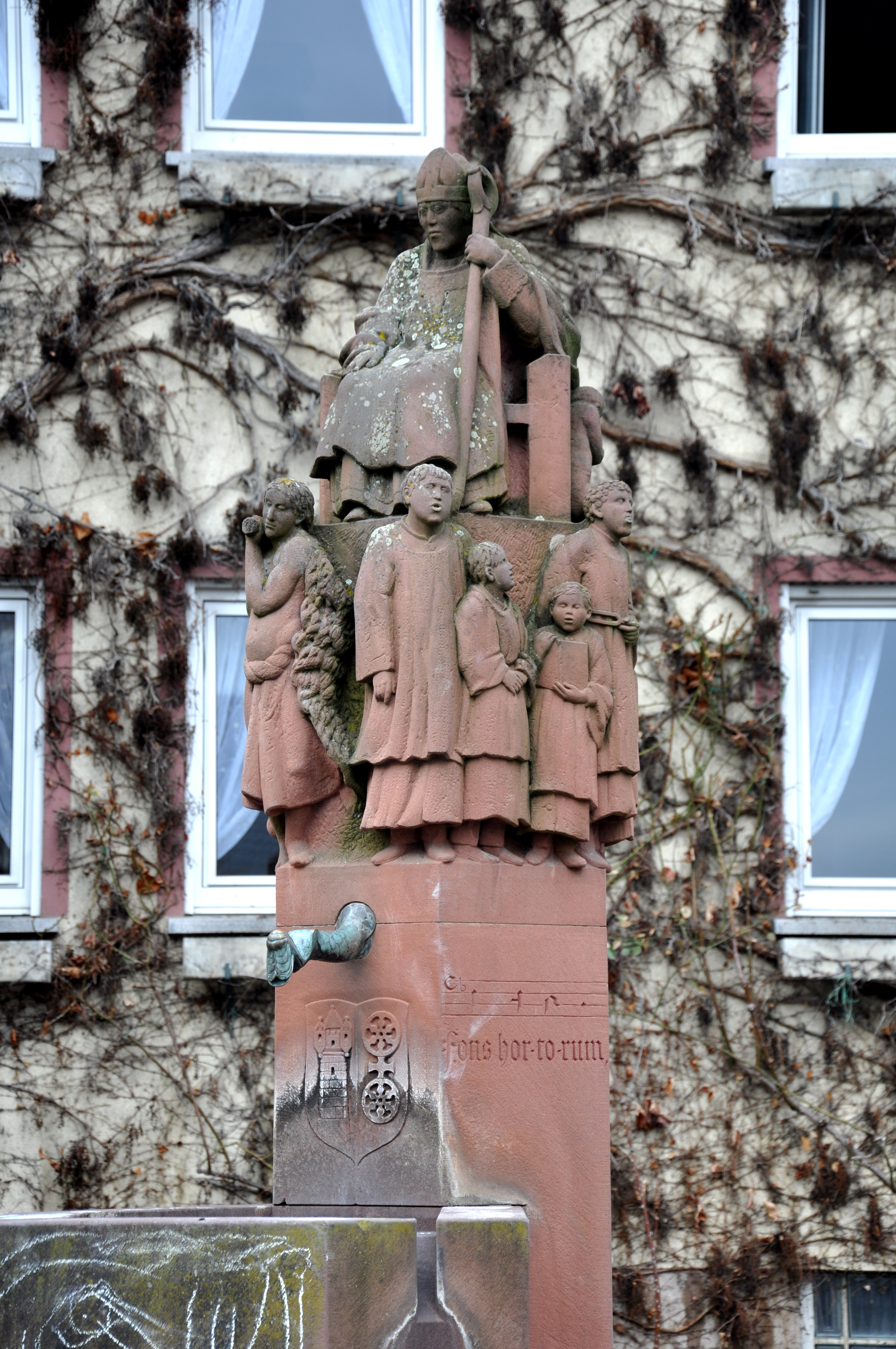 Kiedrich, Neuer Marktbrunnen, 1977, von Karl Matthäus Winter (Limburg an der Lahn)